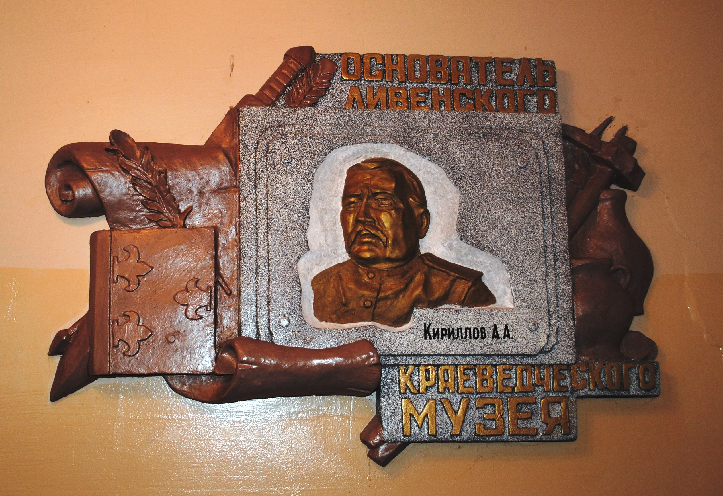 Кириллов А.А.